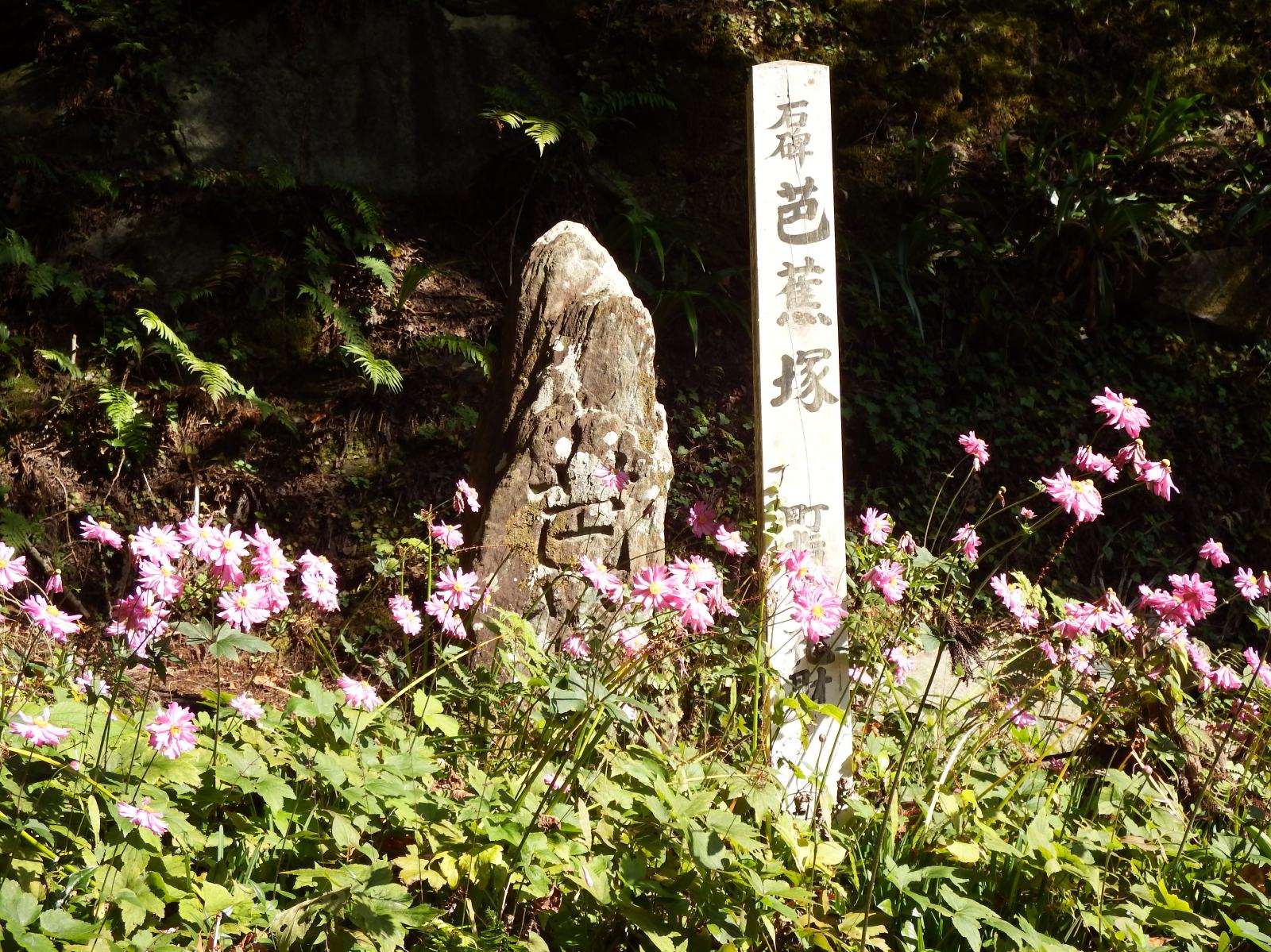 大宝寺の芭蕉塚